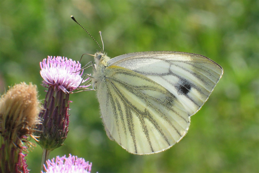 Rapsweißling (Pieris napi) auf Cirsium arvense